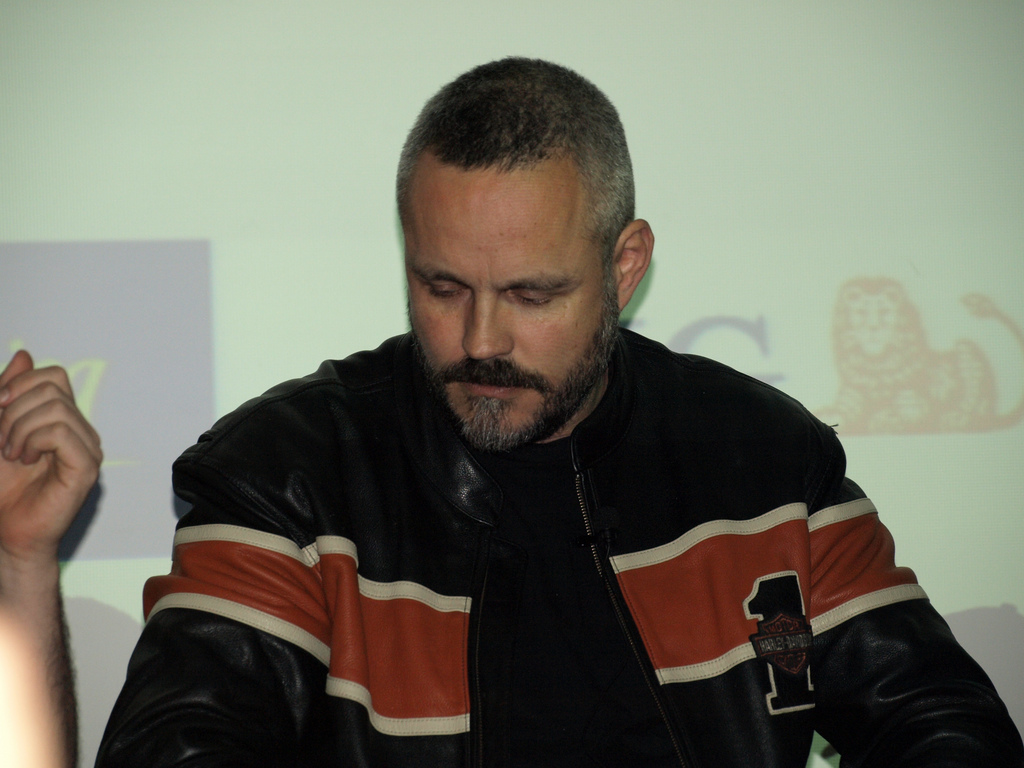 El creador de Commandos, en el Gamelab 2008